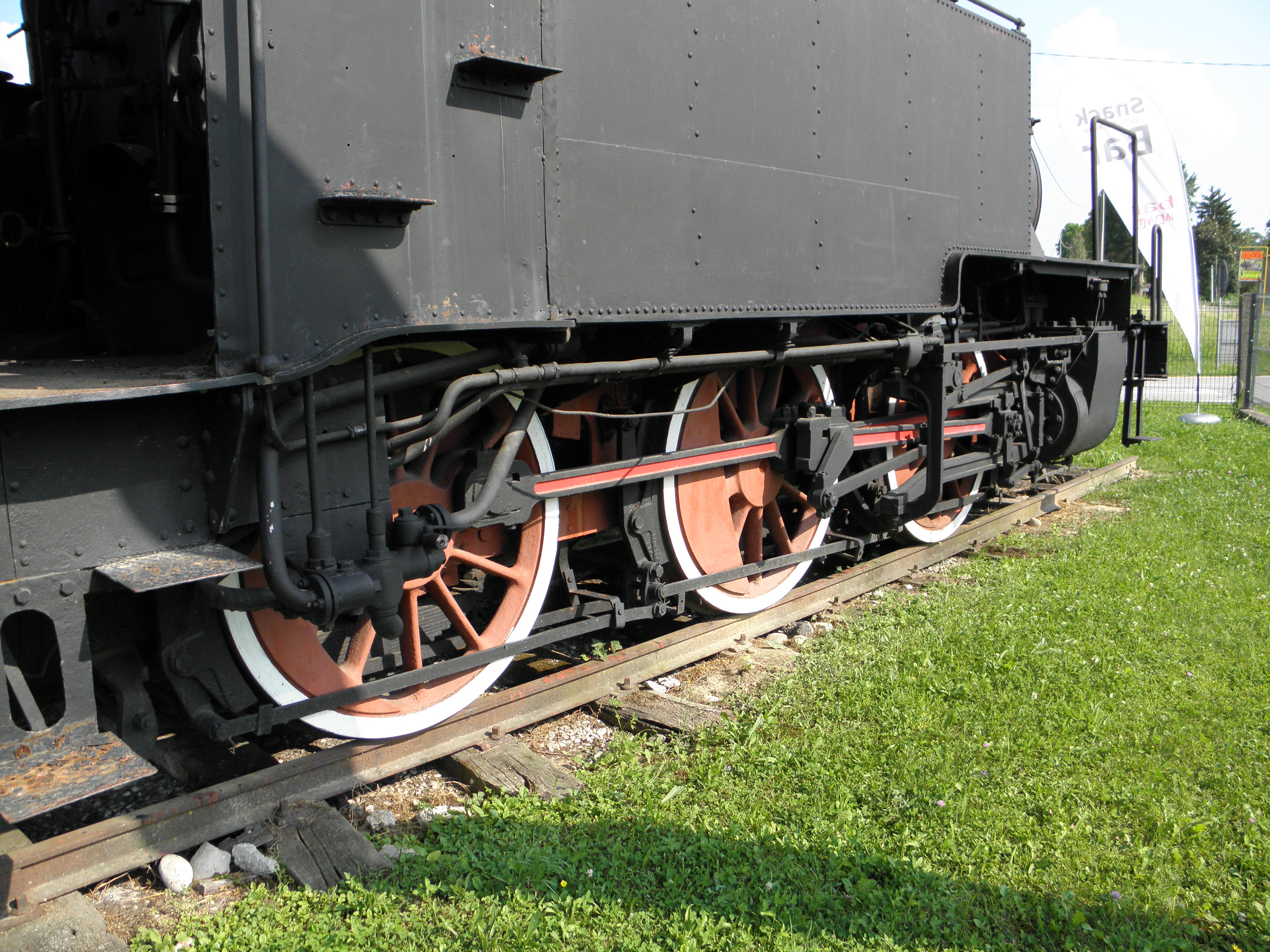 Campo San Martino, centro commerciale "La Locomotiva": la locotender FS 835.291 monumentata nel piazzale del centro commerciale.